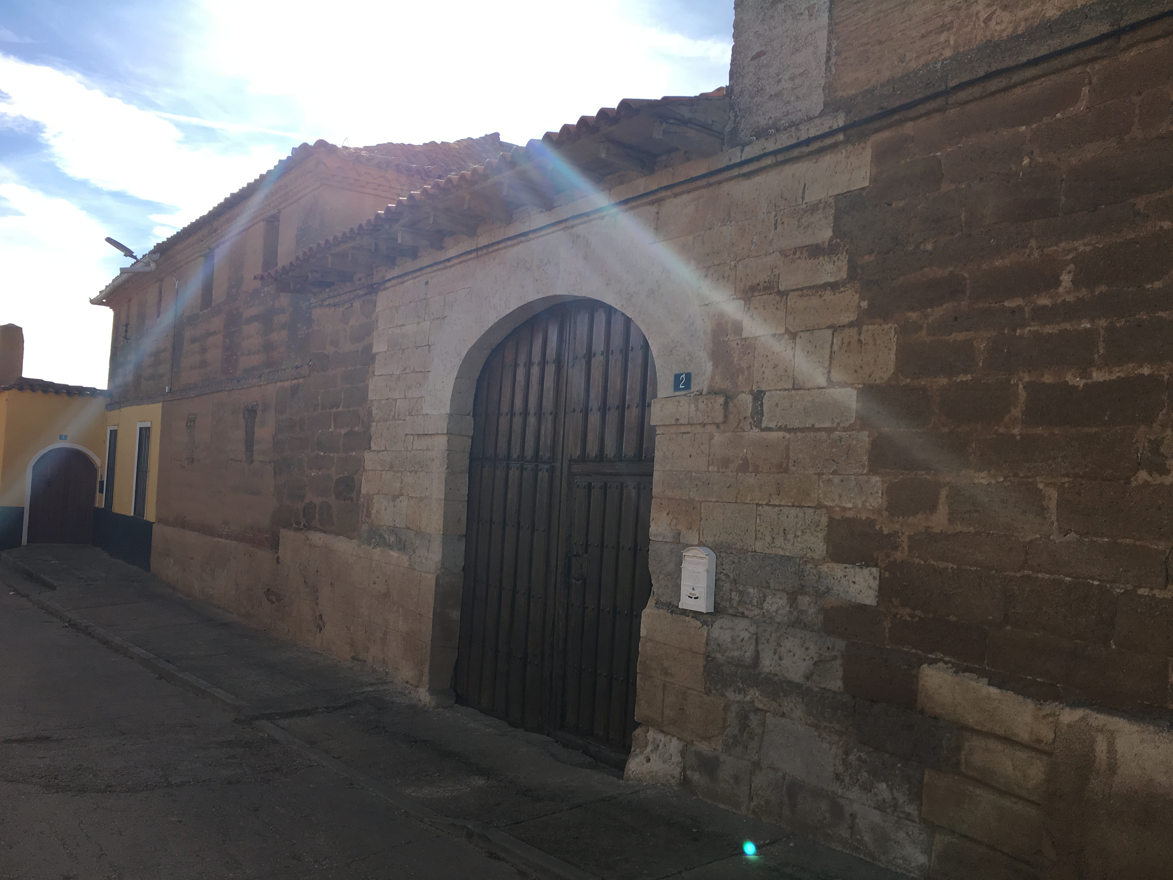 Villaesper Milenario